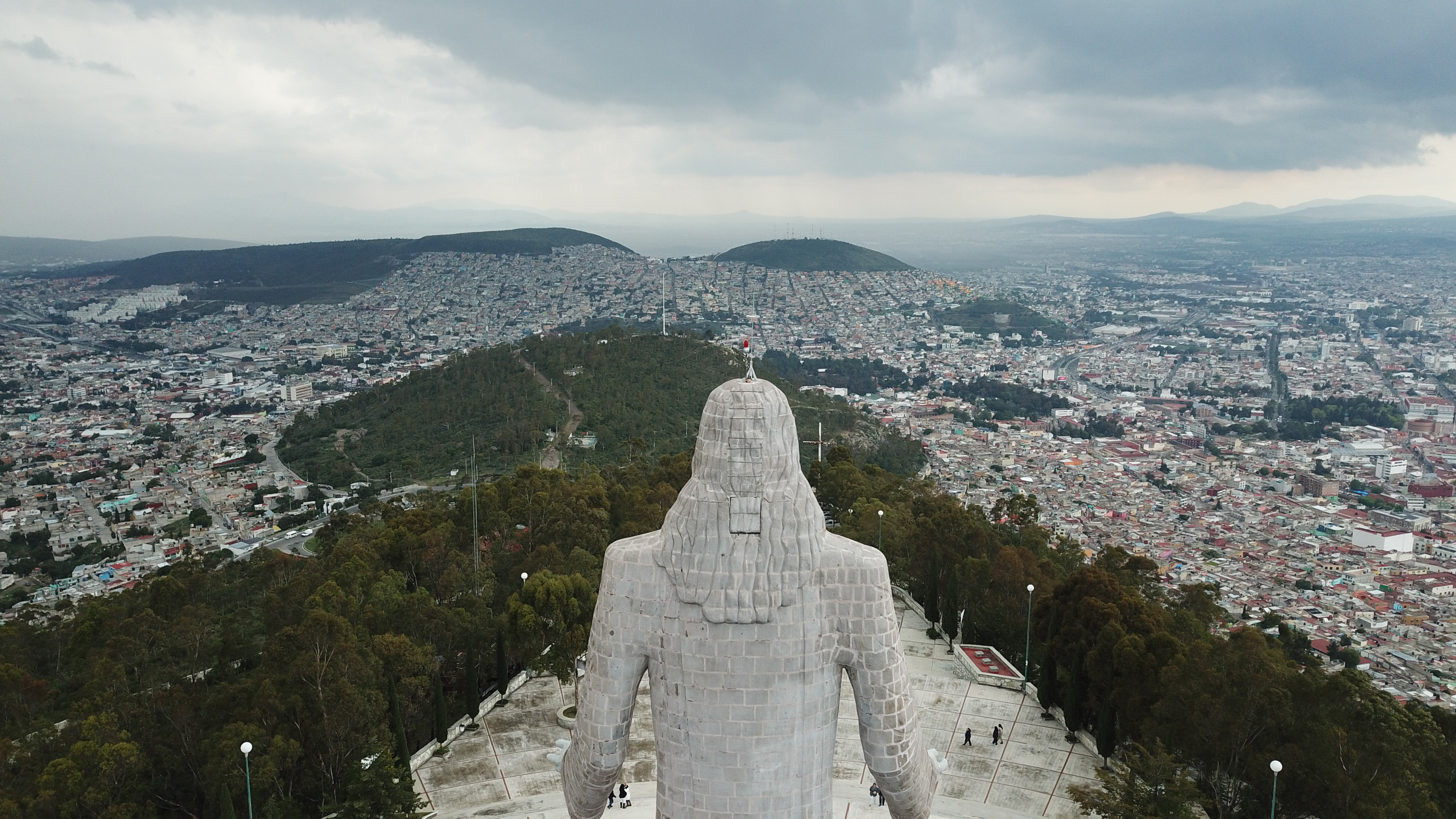 Cristo Rey de Pachuca en Hidalgo, México